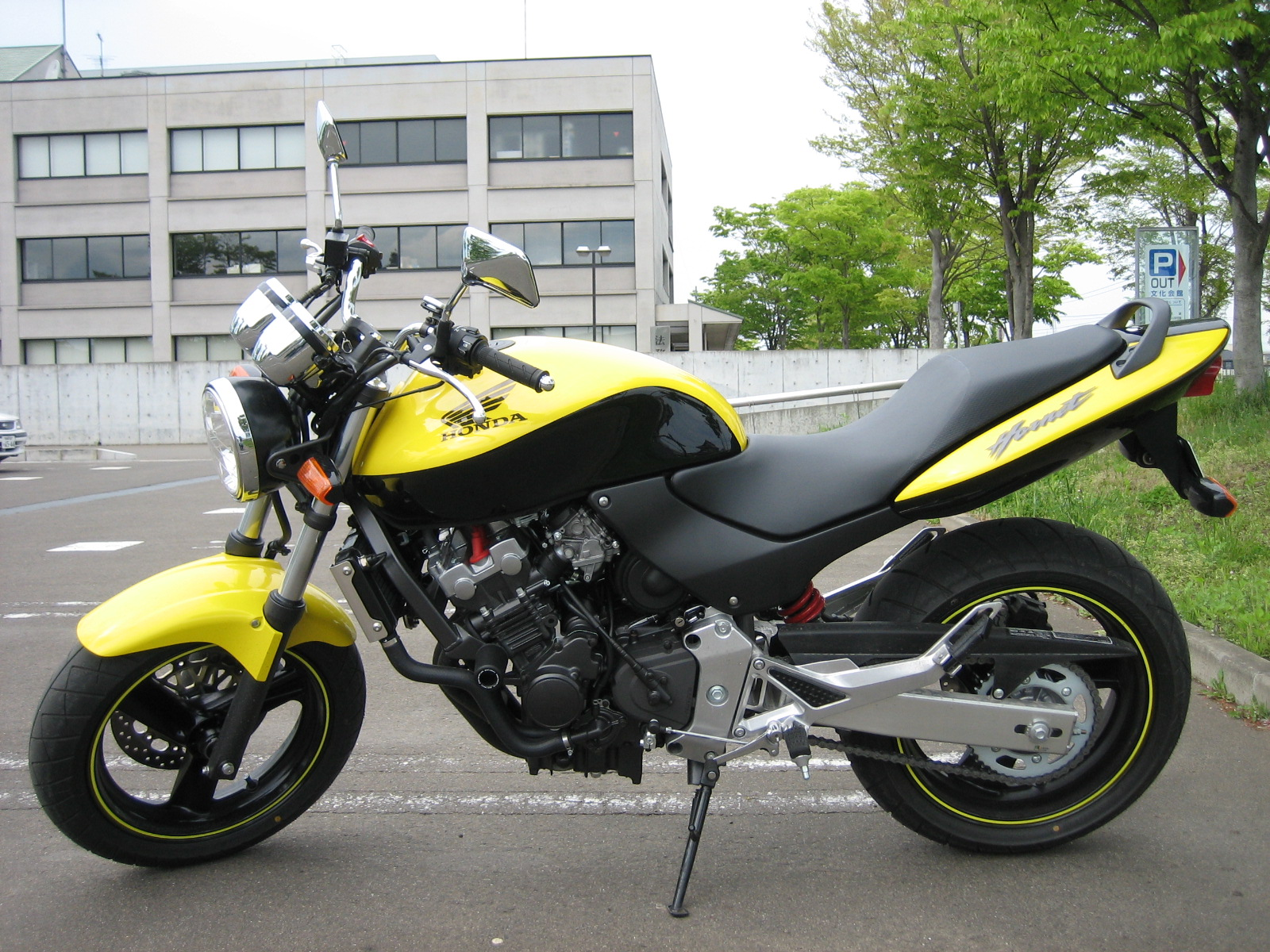 ウィキペディア（Wikipedia）で使用します。 Honda Hornet 250